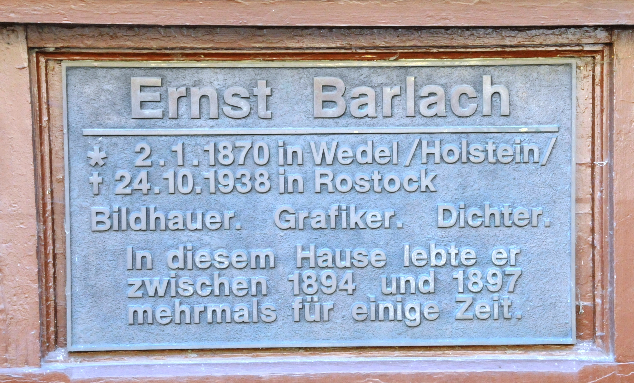 Gedenktafel am Hause Friedrichroda, Alexandrinenstraße 26, in dem Barlach mehrfach seinen Urlaub verbrachte.